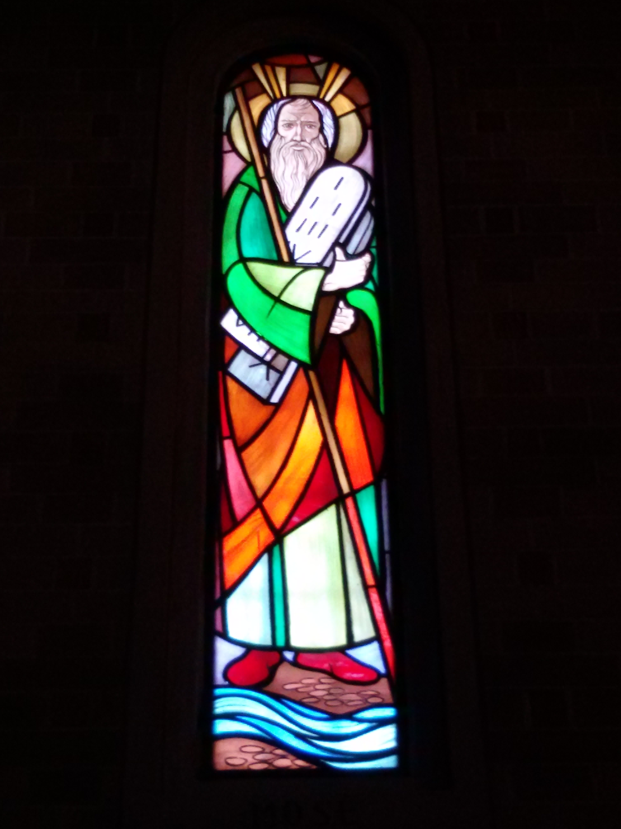 vetrata